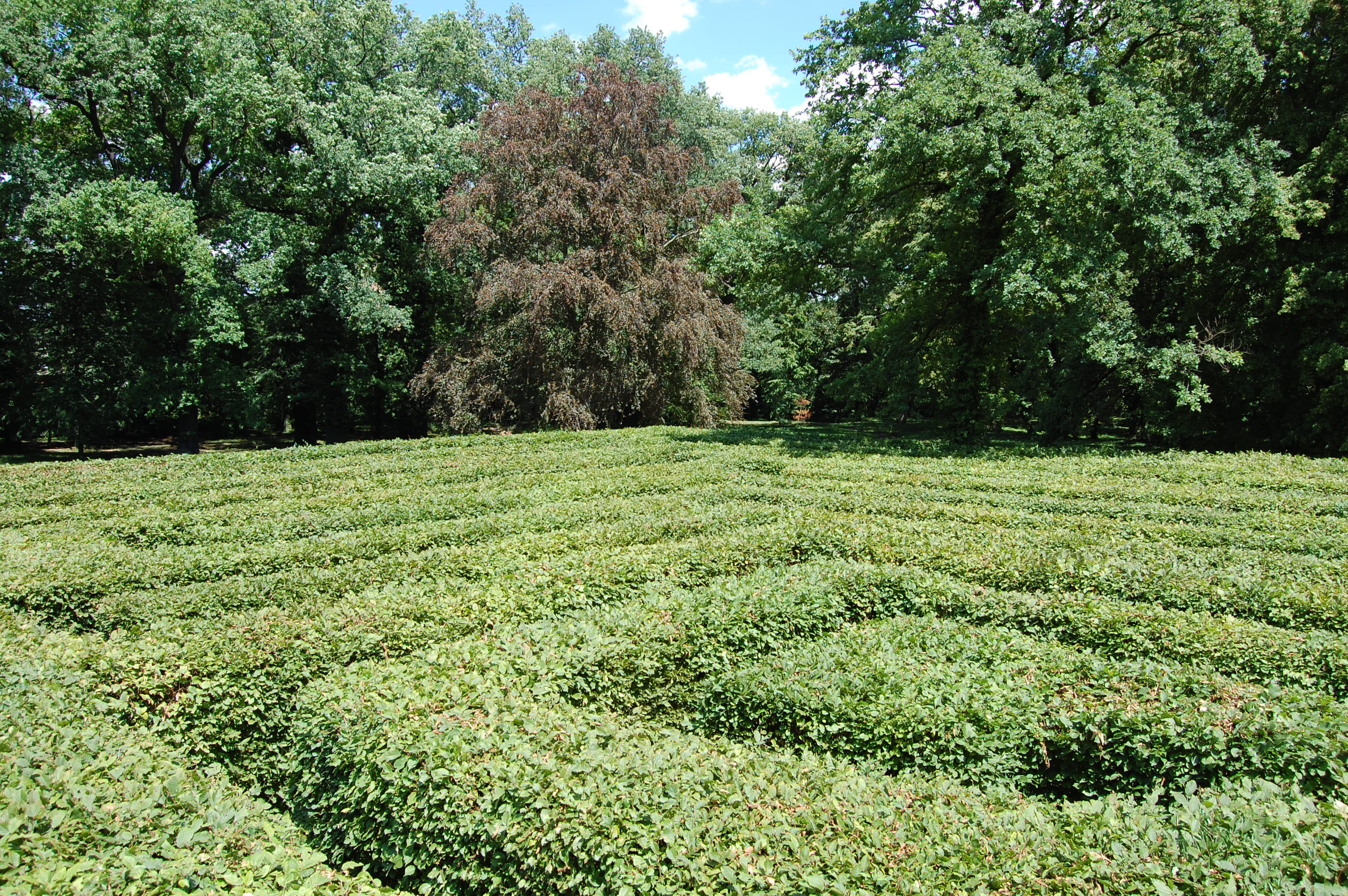 Irrgarten in Alt Jeßnitz